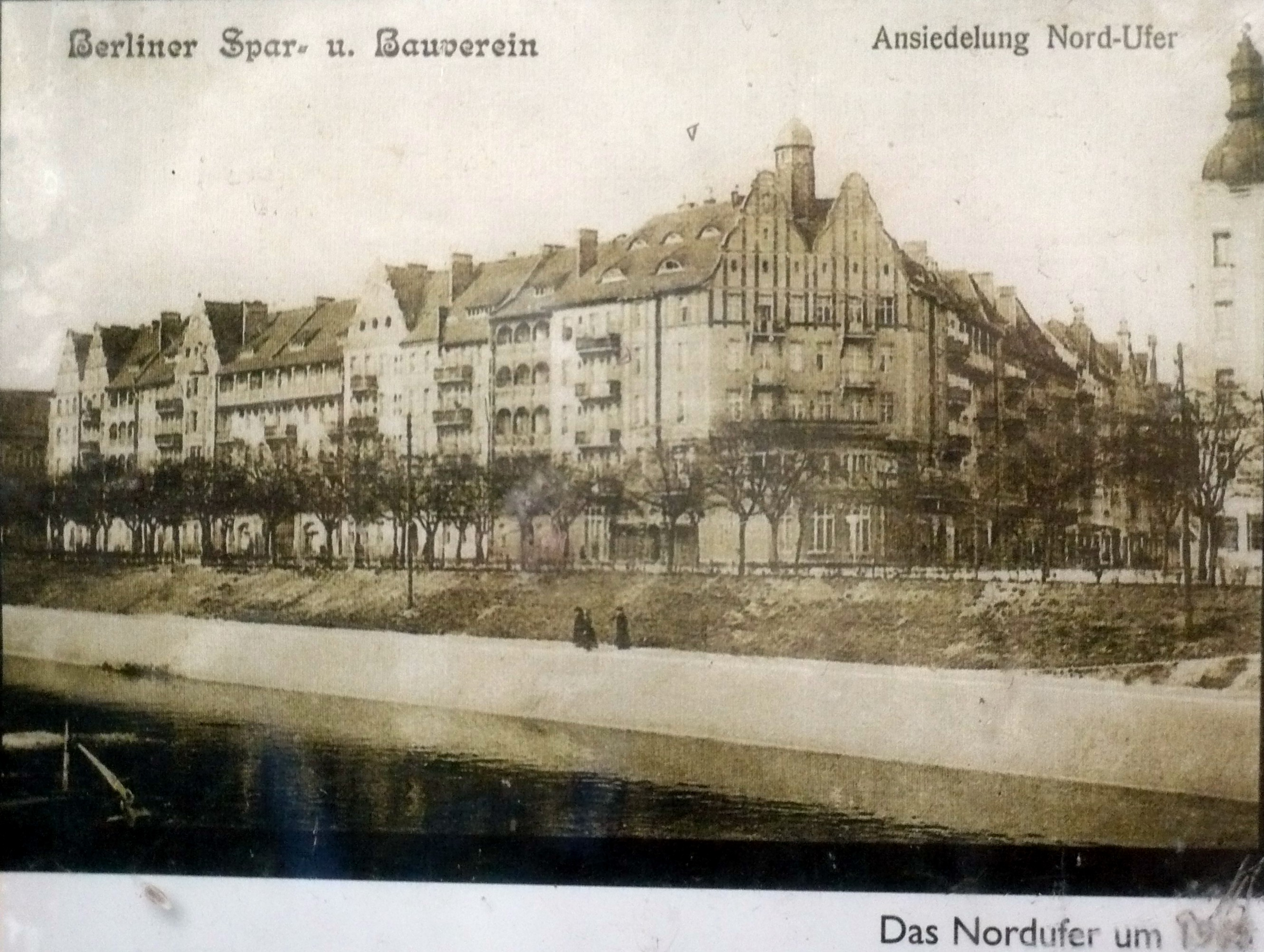 Ortsteil Berlin-Wedding/ Nordufer histor. Ansicht ca. 1905